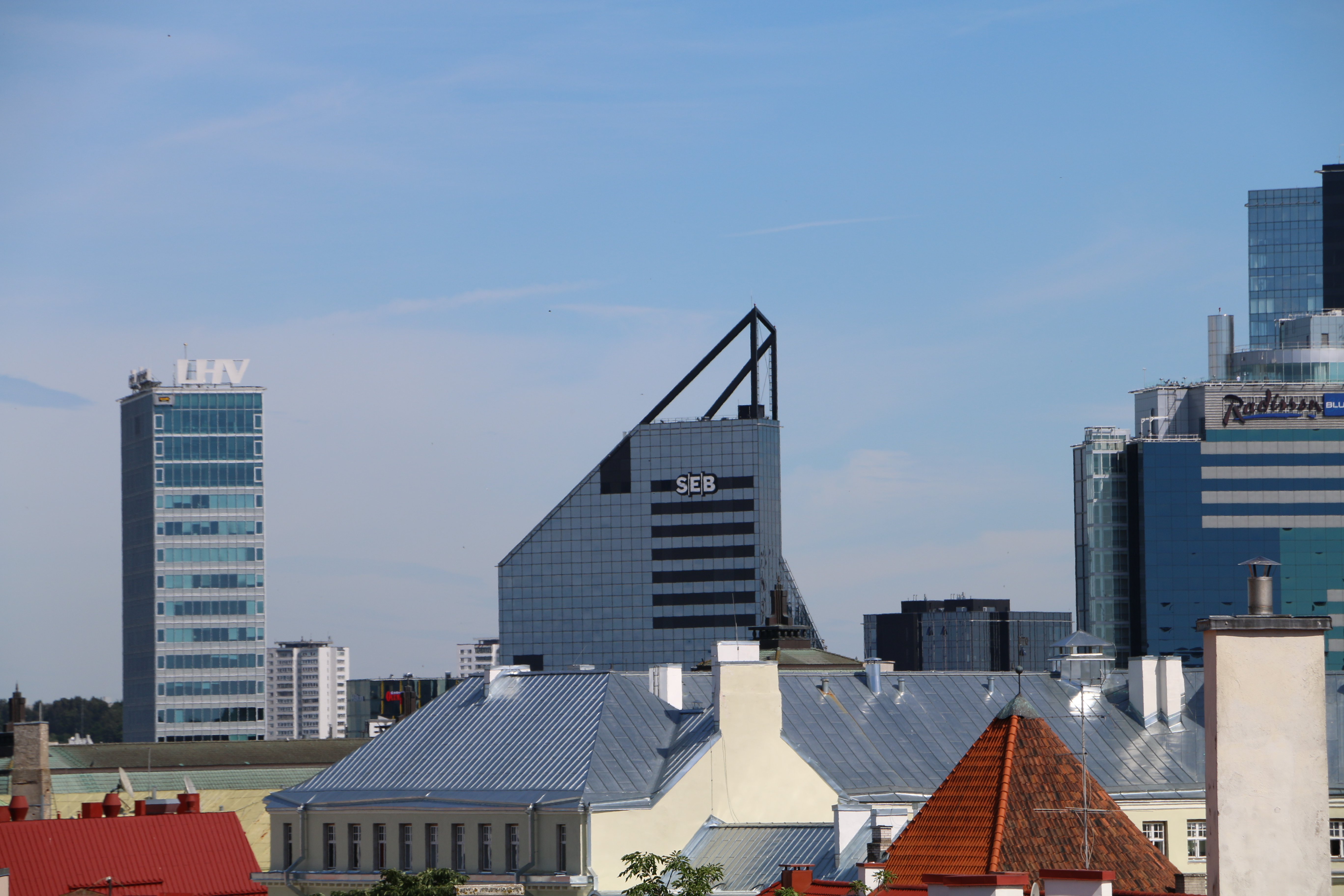 LHV, SEB ja Radissoni hooned Tallinnas